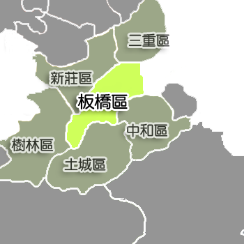 板橋區相對位置。